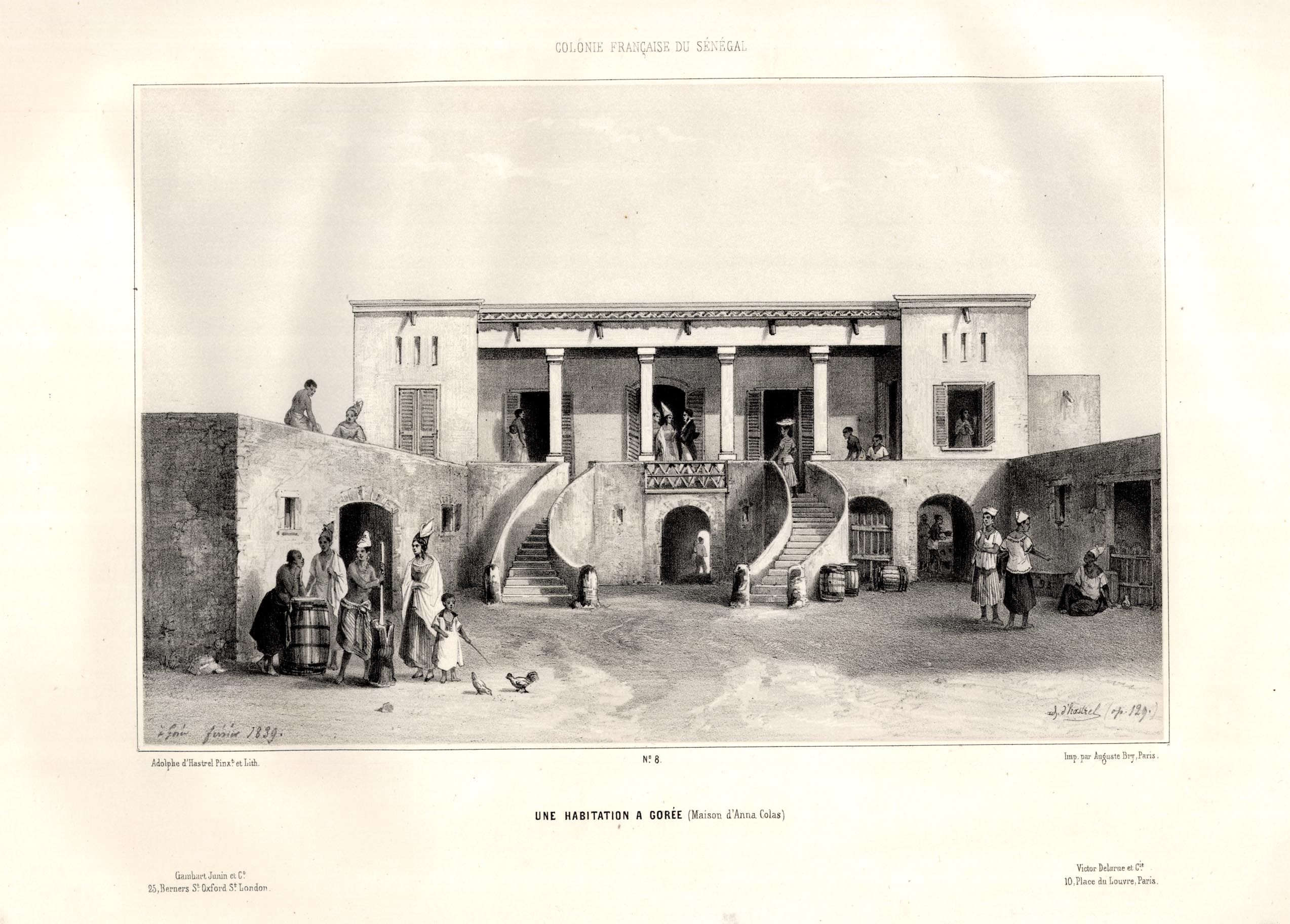 Maison de la signare Anna Colas à Gorée peinte par d'Hastrel de Rivedoux en 1839